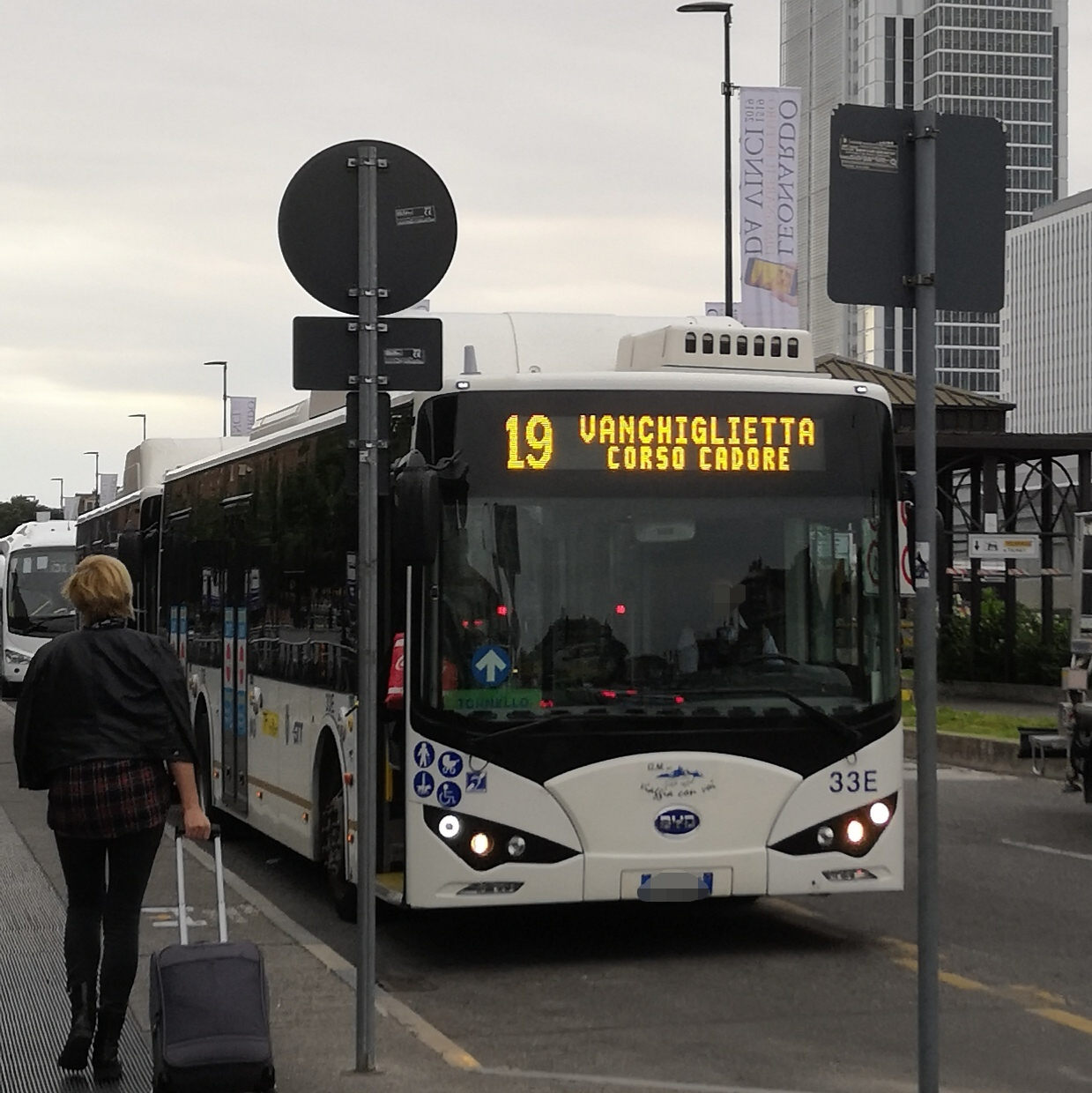 BYD K9 di GTT in servizio a Torino sulla linea 19. Qui al capolinea di Porta Susa.